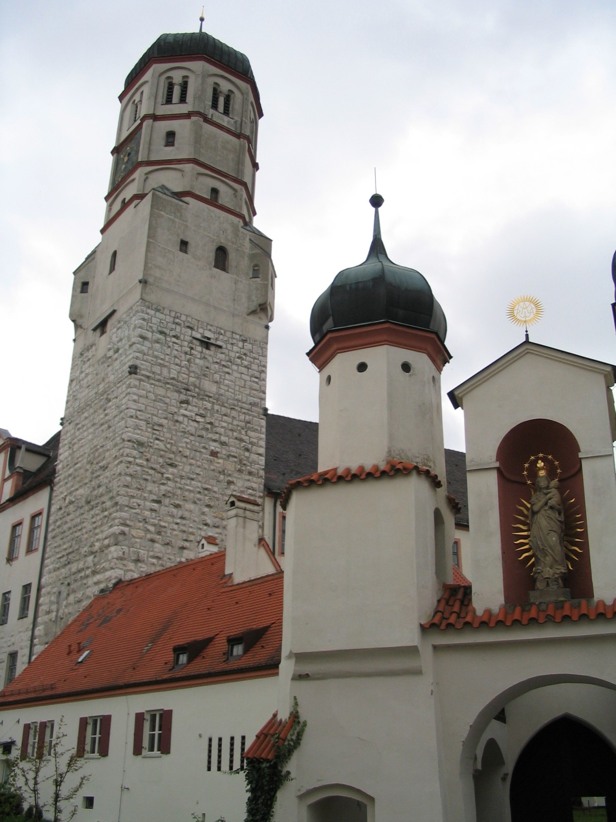 Castle in Dillingen, Germany